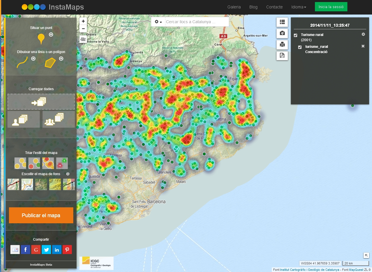 Editor d'Instamaps.ICGC